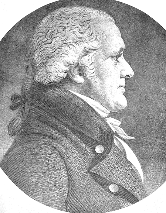 Portrait of Perez Morton. By Charles Balthazar Julien Févret de Saint-Mémin. ca.1793-1814.